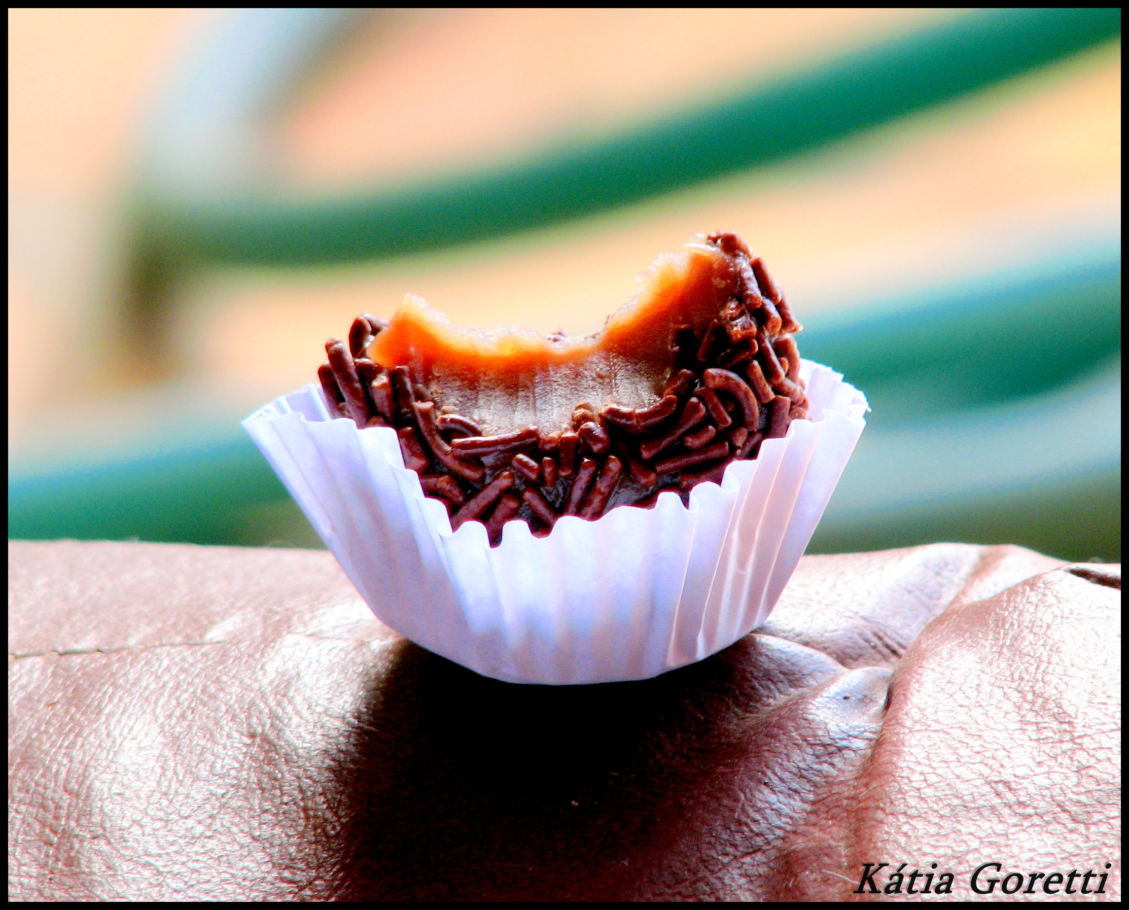 docinho docinho docinho